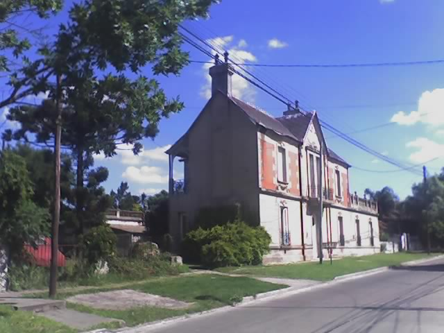 Mansión inglesa construida en Merlo en 1911.